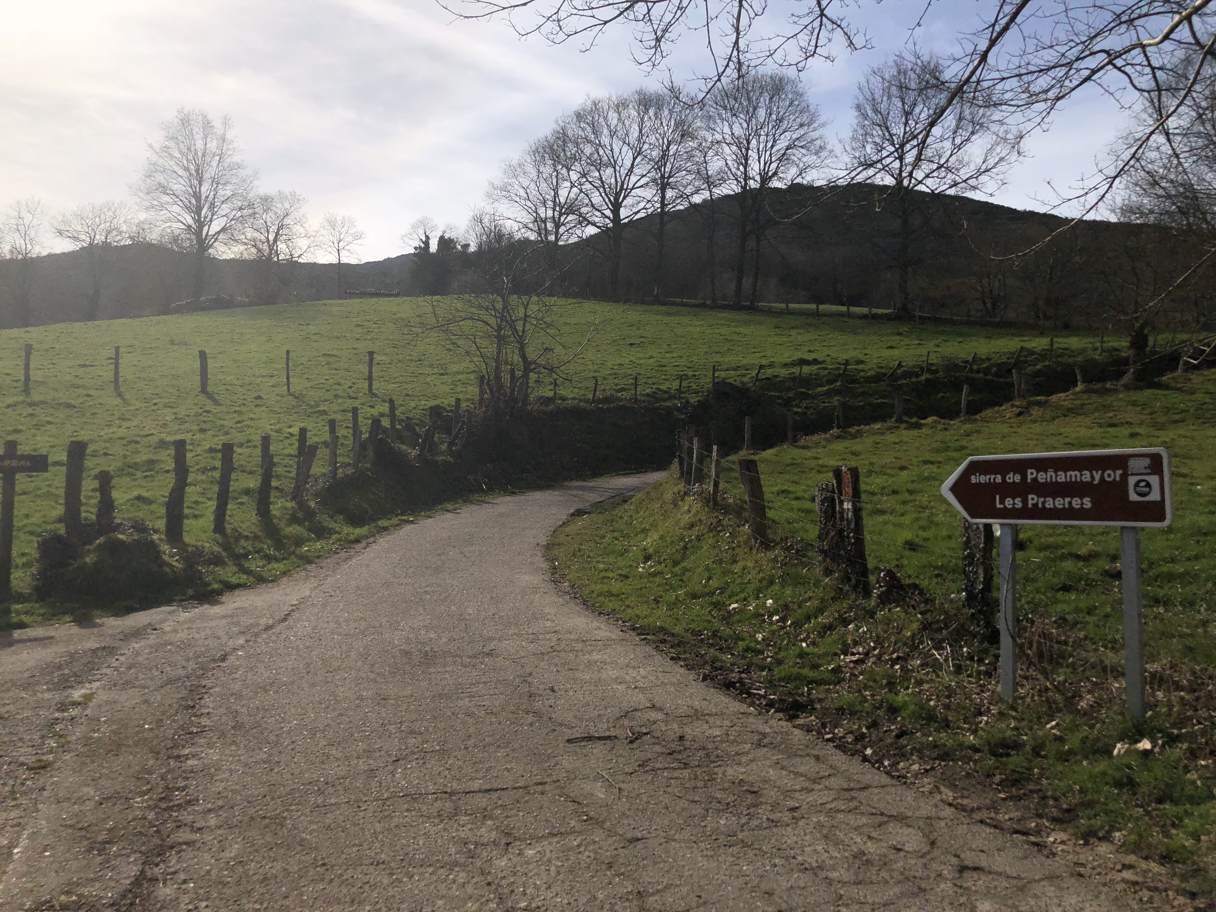 Inicio del ascenso hacia Las Praderas, en Nava, Asturias (España)